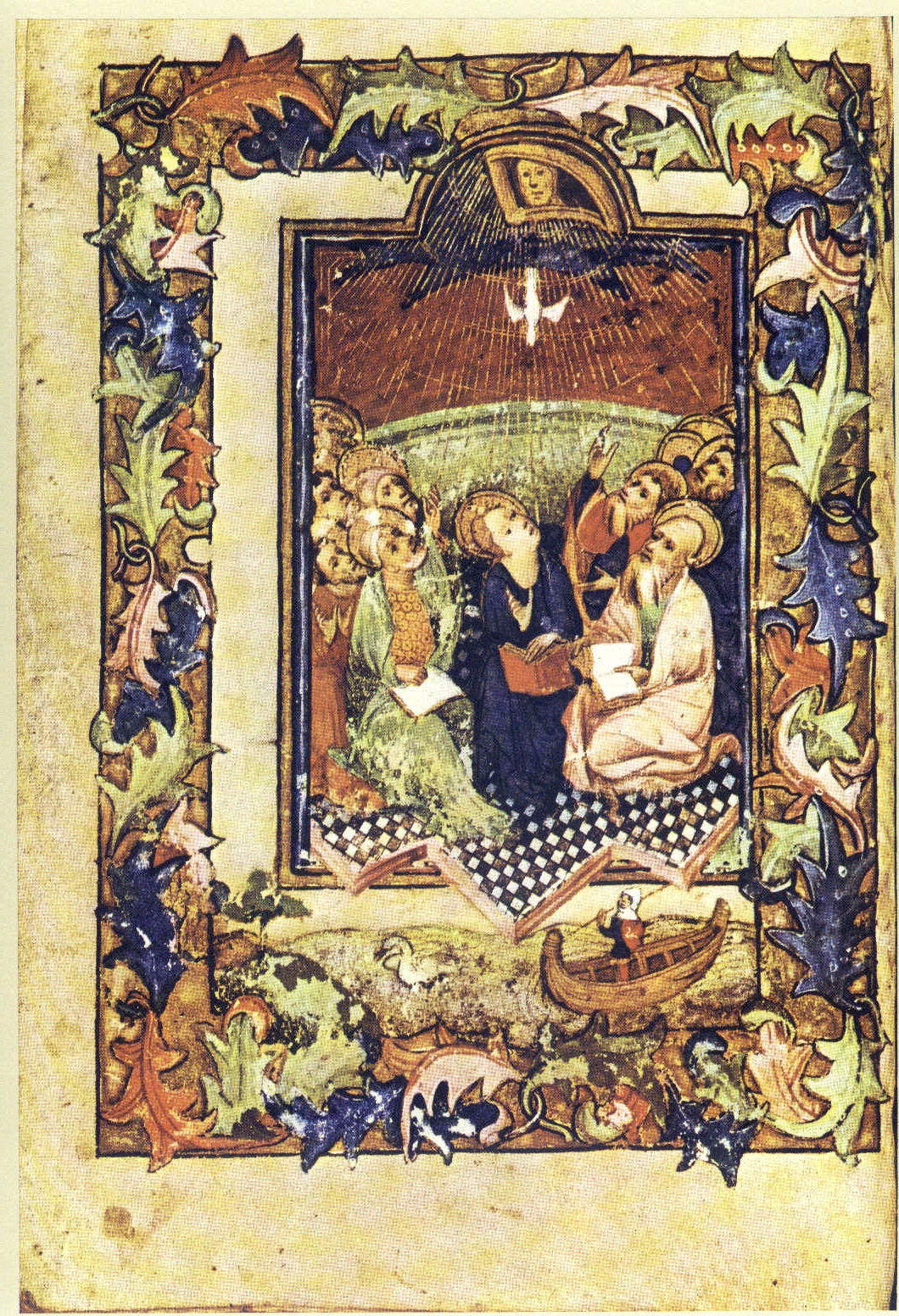 Miniatur